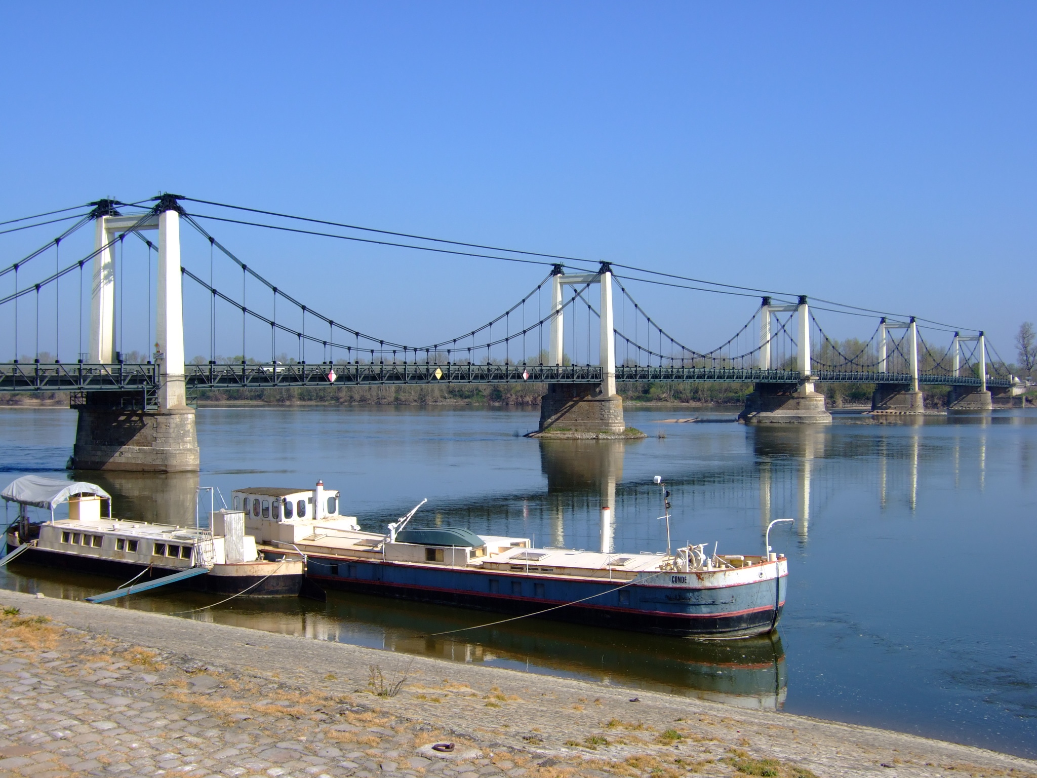 Le pont de Montjean-sur-Loire